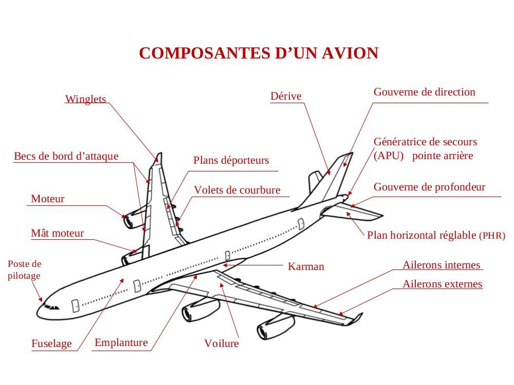 Éléments principaux d'un avion